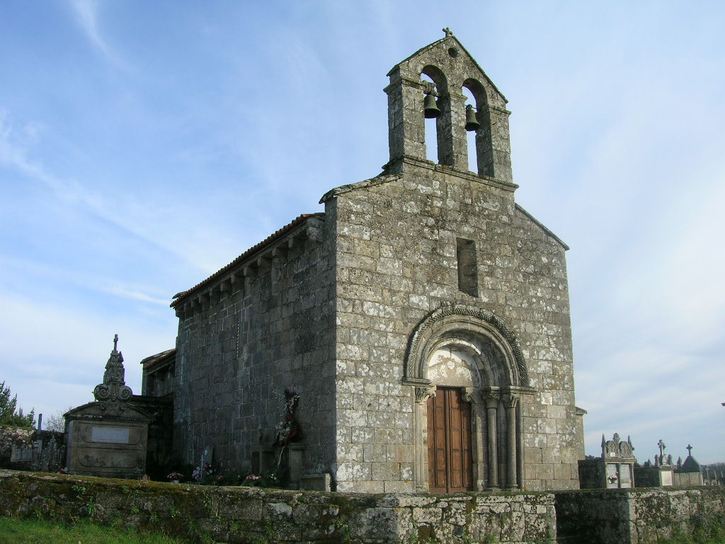 Igrexa de Santo Tomé de Maside, Maside, Galiza. Igrexa románica do século XII, de planta rectangular dunha soa nave. No interior foron descubertas baixo o cal da súa absida, restos de pinturas renacentistas.